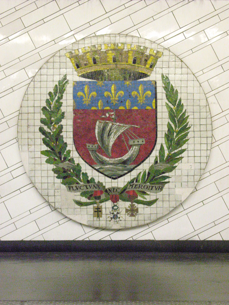 Paris - station Hôtel de Ville - métro ligne 1 - blason de Paris.JPG